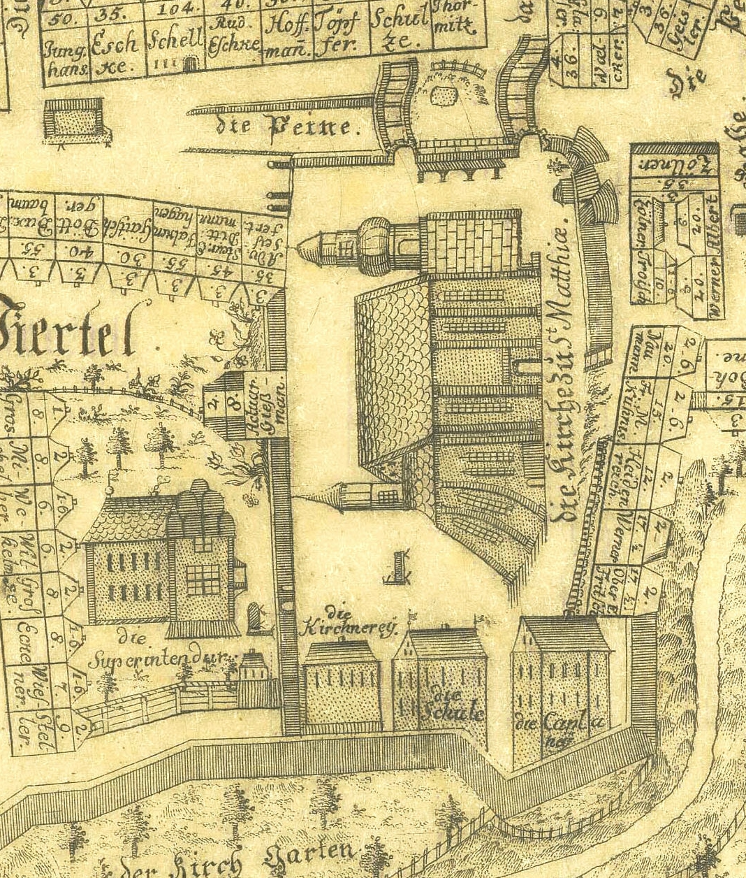 Leisnig, Ausschnitt aus dem Stadtplan von Johann Kamprad (1753)